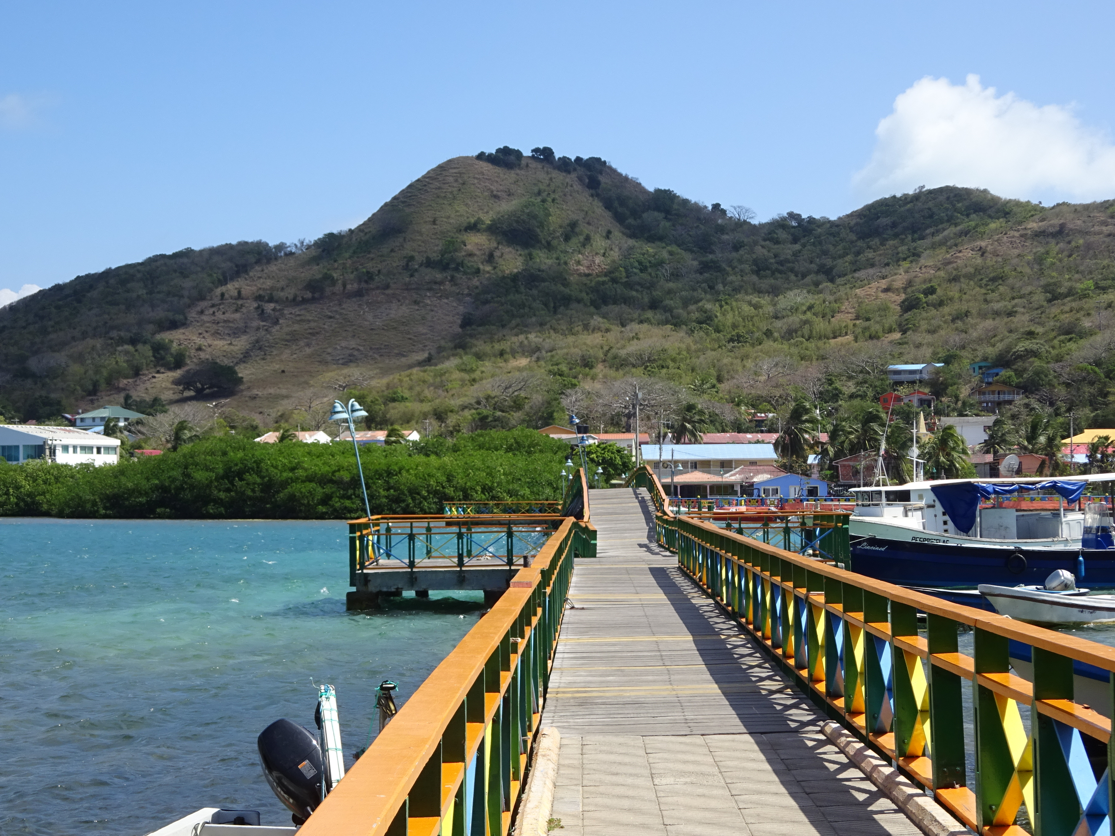 El puente de los enamorados, el cual conecta las islas de Providencia y Santa Catalina